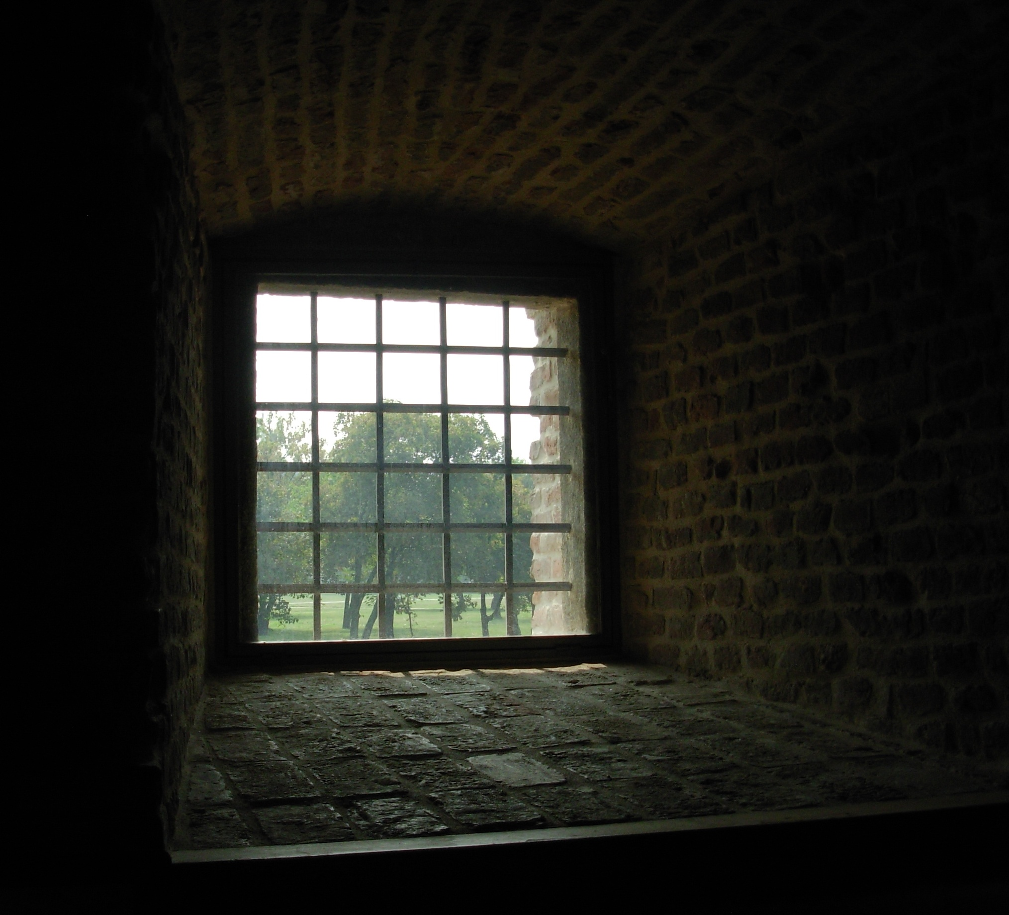 Поглед кроз прозор куле Небојша. Сликао Голдфингер